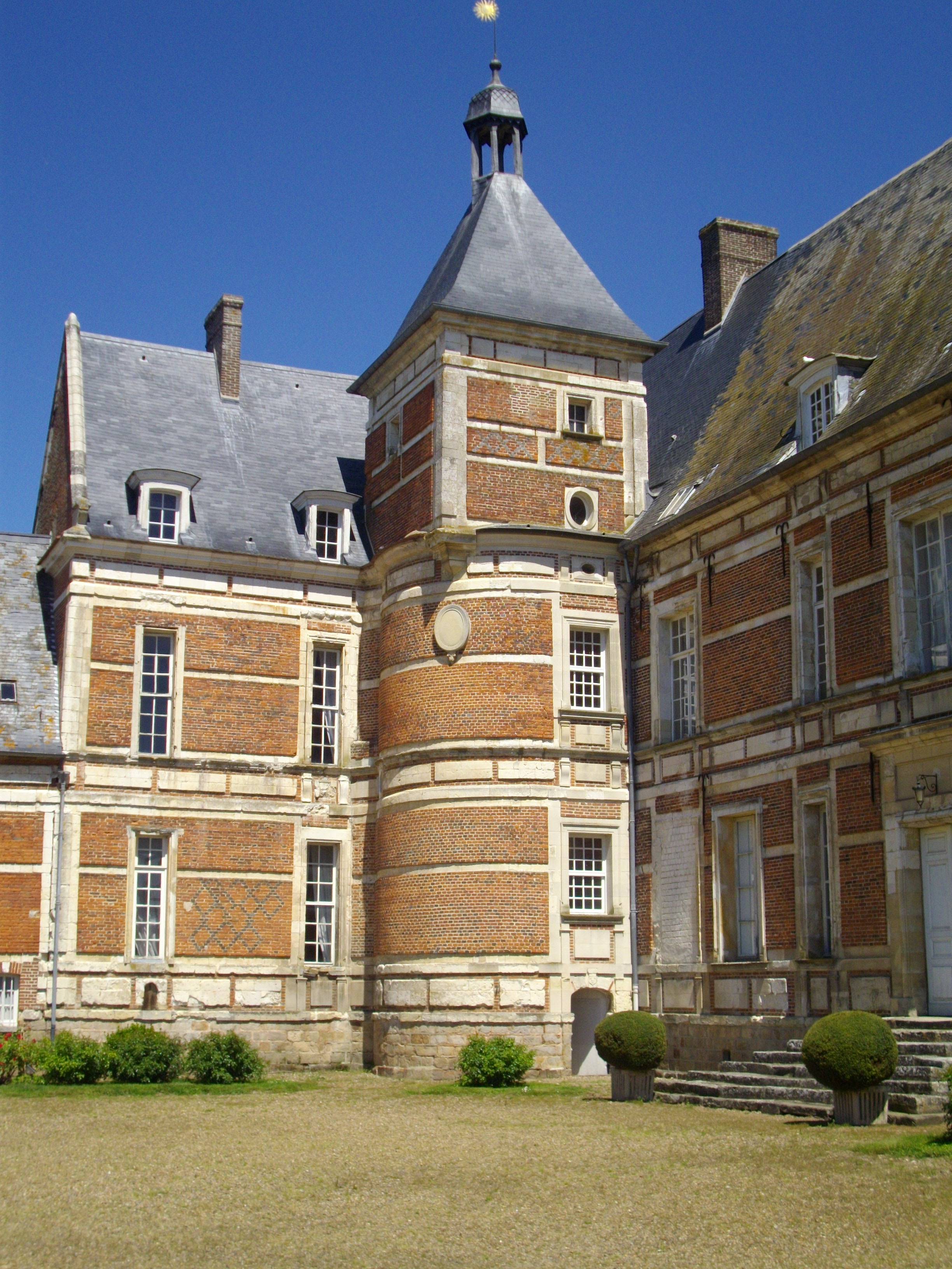 Chateau de Troissereux (Oise)- Tour à l'horloge